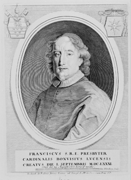 Il cardinale Francesco Bonvisi (1626-1700)